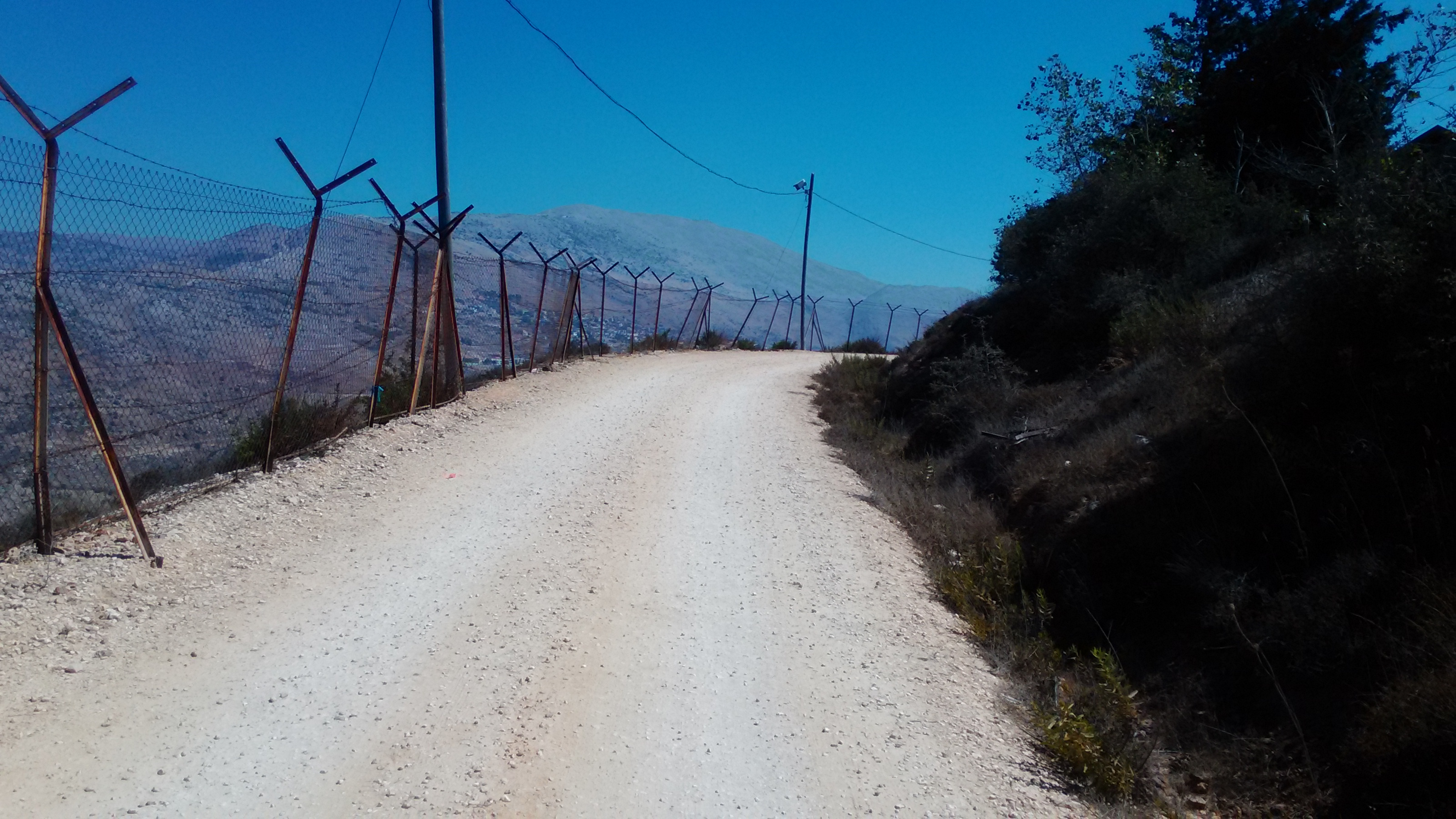 דרך היקפית ביישוב